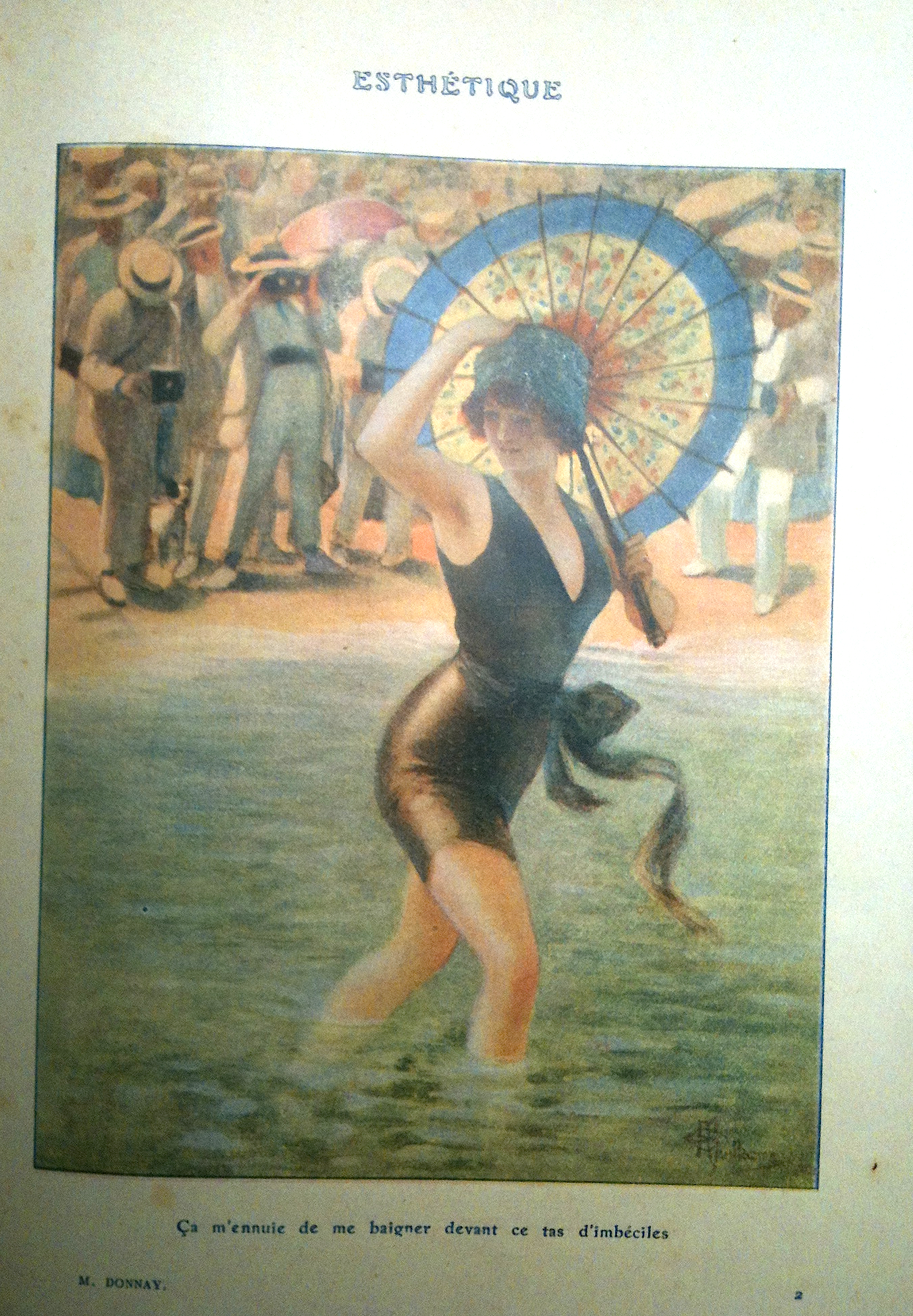 — Ça m'ennuie de me baigner devant ce tas d'imbéciles Dessin d'Albert Guillaume, sur un texte de Maurice Donnay, intitulé Esthétique.